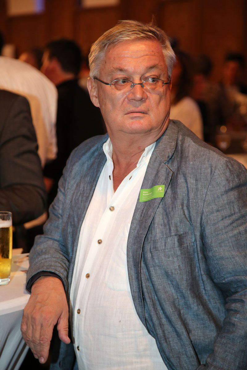 Kronberger.Hans-0492